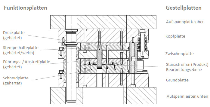 Stanzwerkzeugbau Viersäulengestell